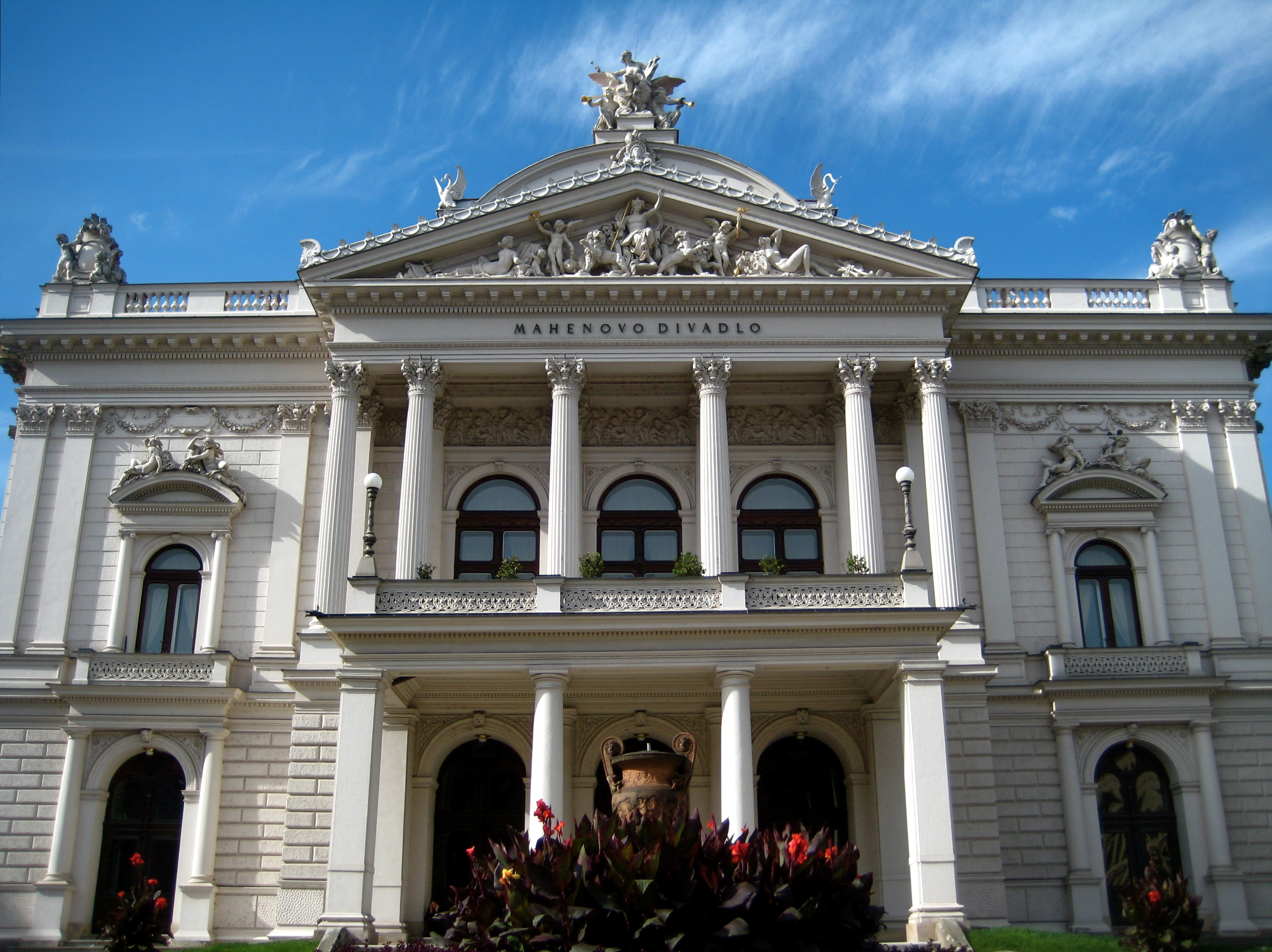 Mahenovo Divadlo